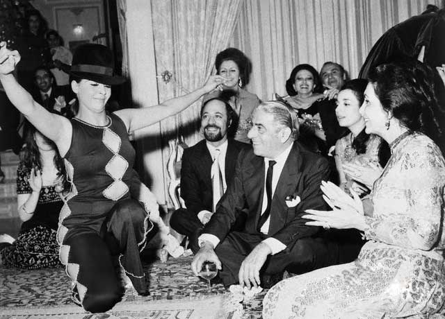 رقص جمیله در حضور ارسطو اوناسیس